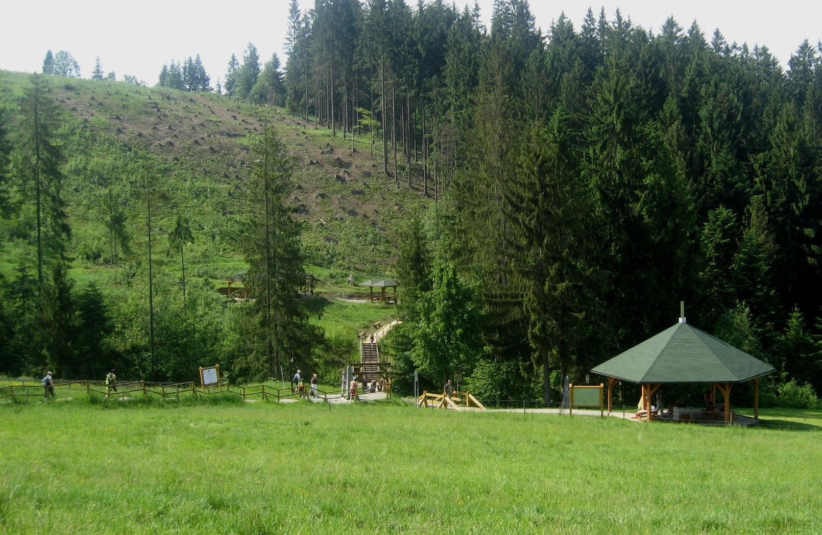 Trójstyk